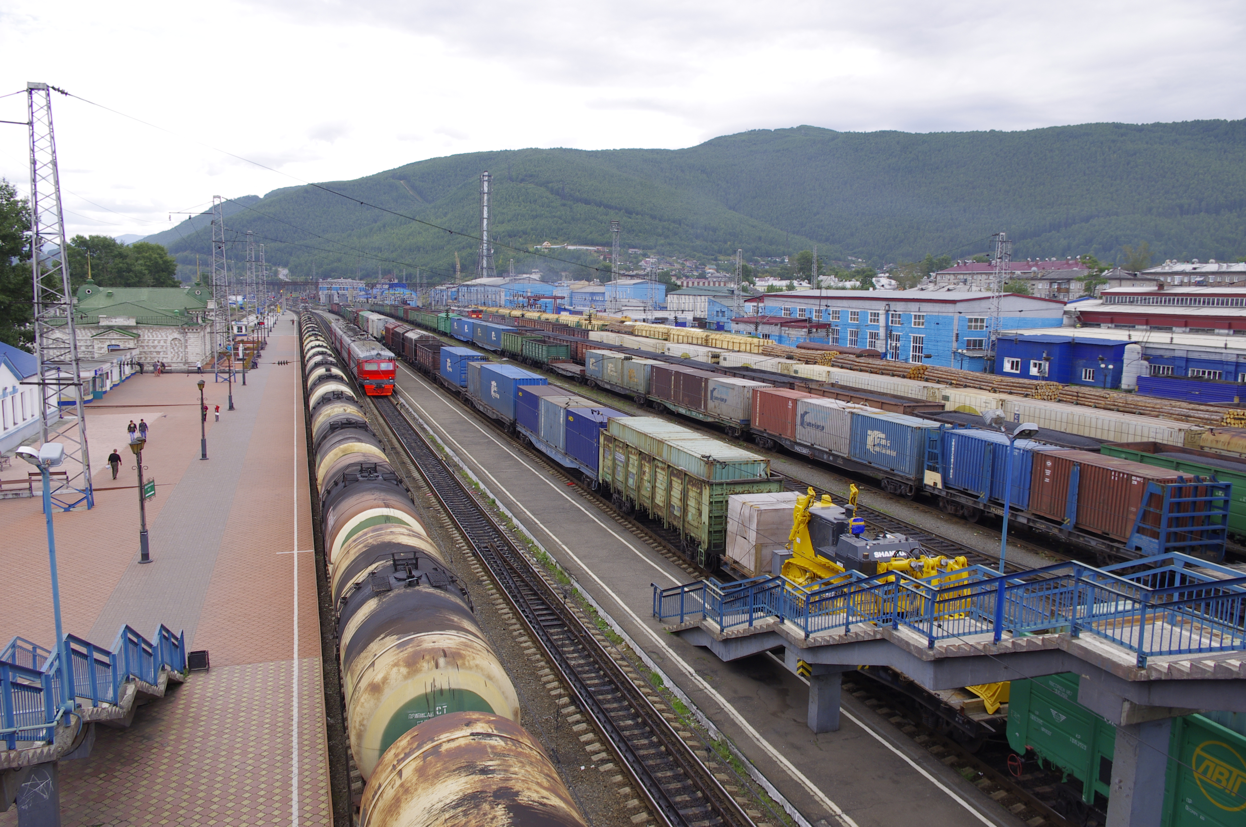 Slyudyanka I railway station